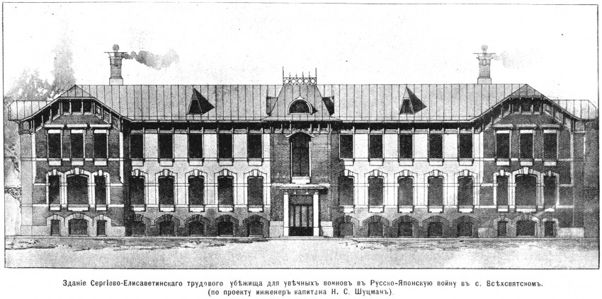 Проект Сергиево-Елизаветинского убежища для увечных воинов русско-японской войны.